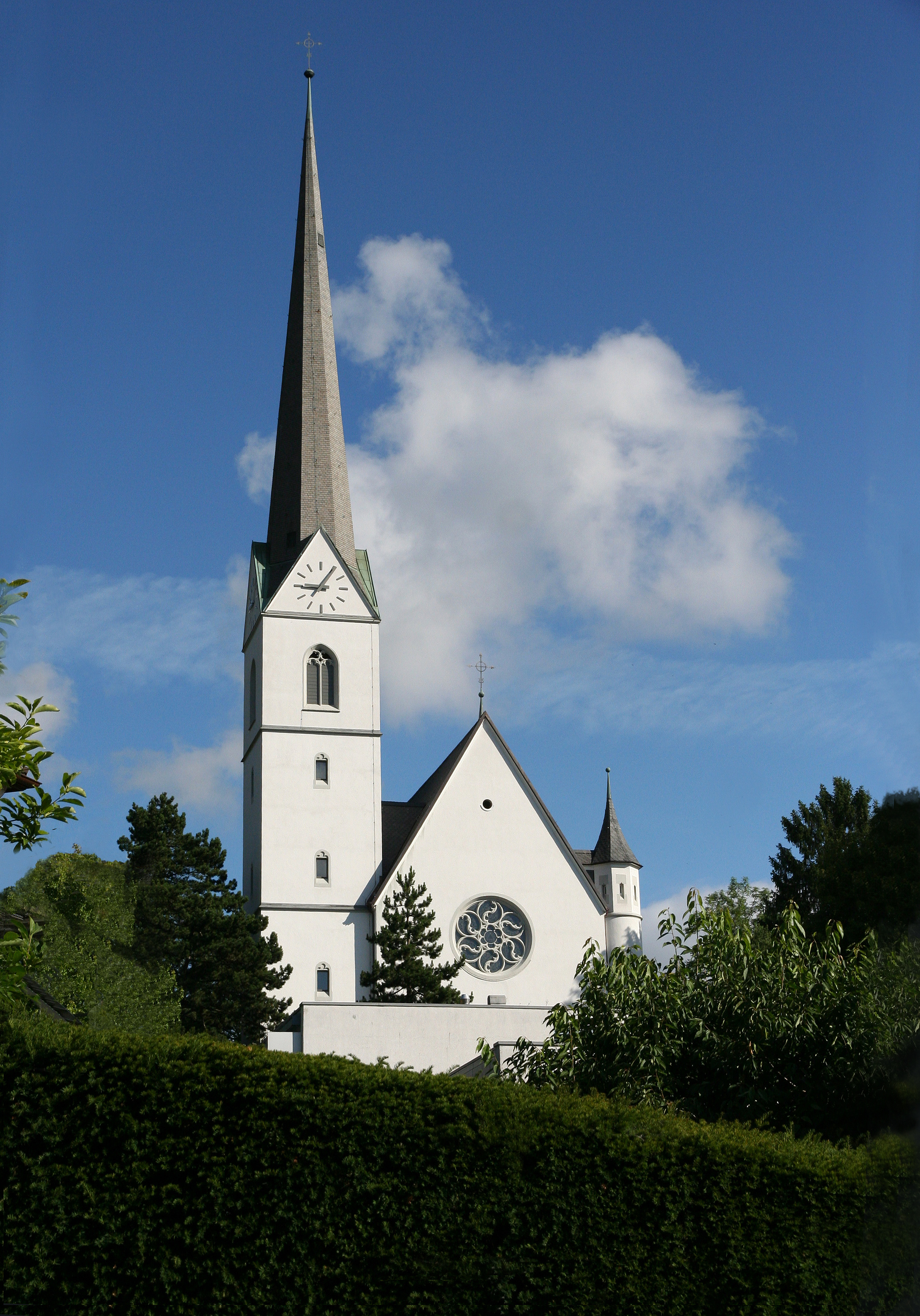 Römisch-katholische Pfarrkirche Hl. Dreifaltigkeit Adliswil, Ansicht von Süden